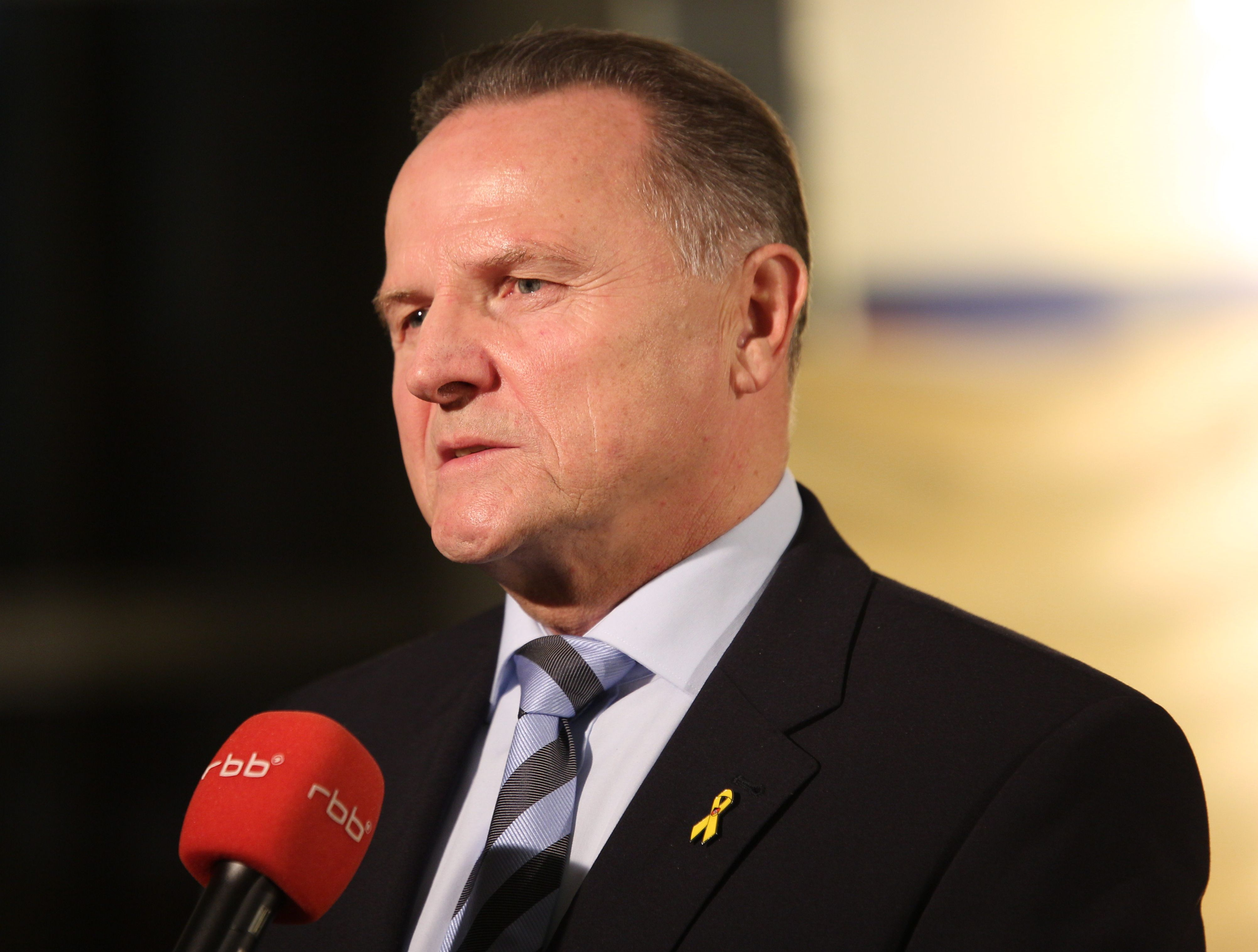 Georg Pazderski (AfD)